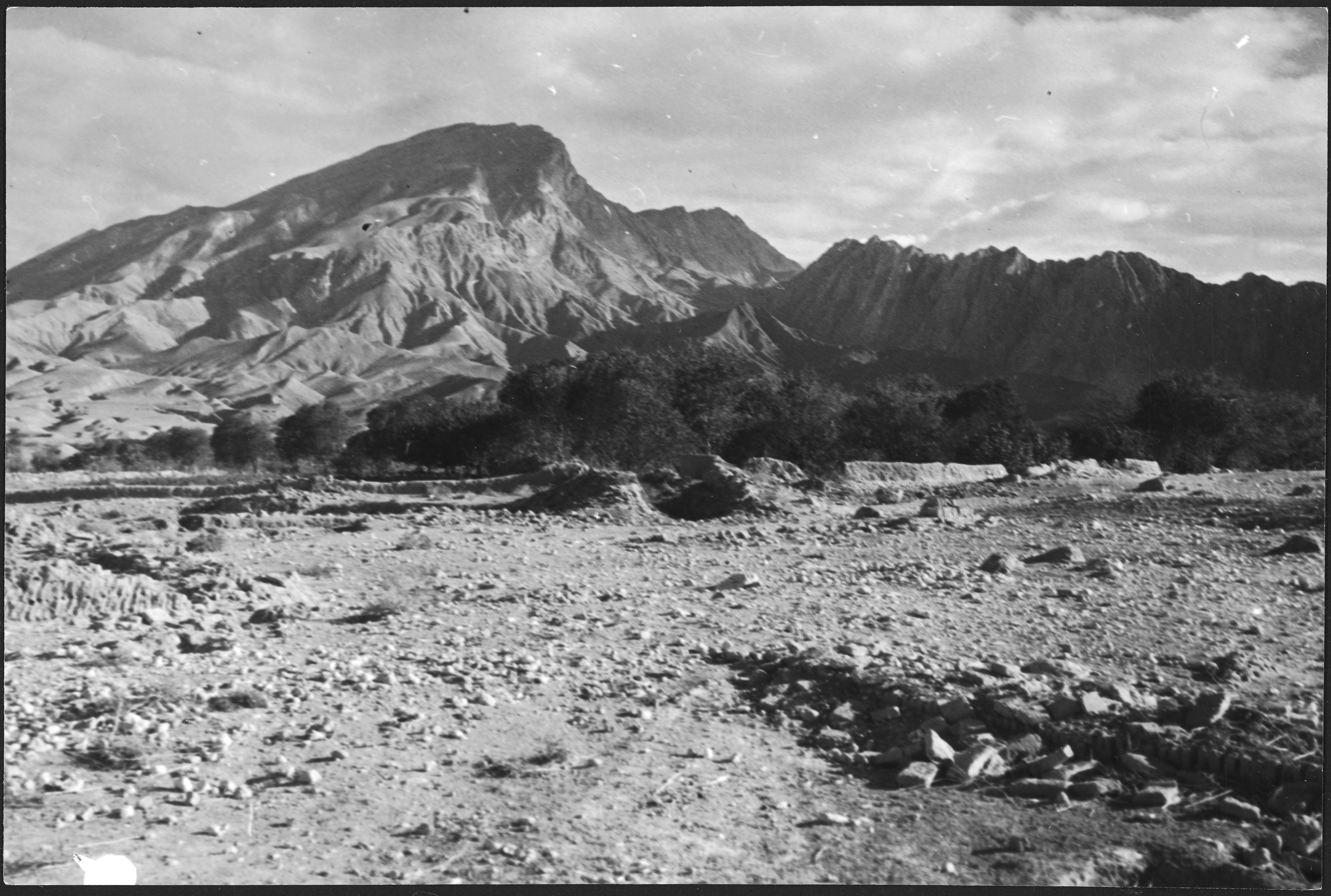 Afghanistan, Tash Kurgan (Khulm, Kholm): Landschaft; Blick auf Berge